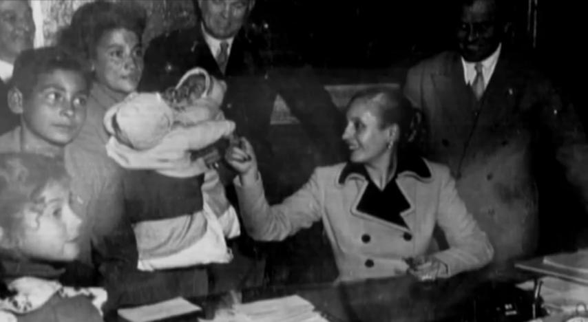 Eva Perón, esposa del Presidente argentino Juan Domingo Perón, recibe a una familia en la Casa Rosada durante su trabajo en la Fundación Eva Perón.